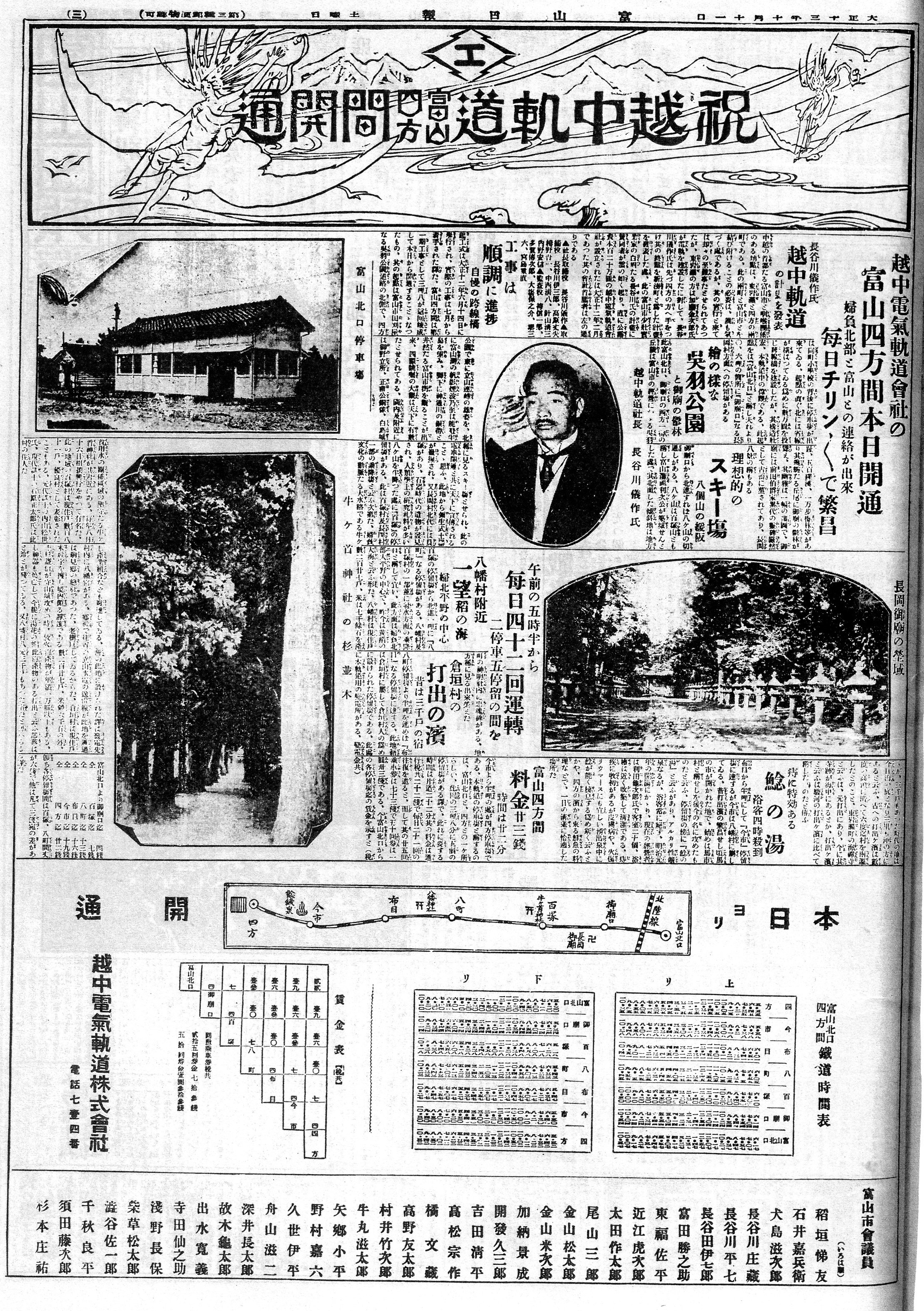 越中電気軌道線富山北口 - 四方間開業を報道する新聞記事